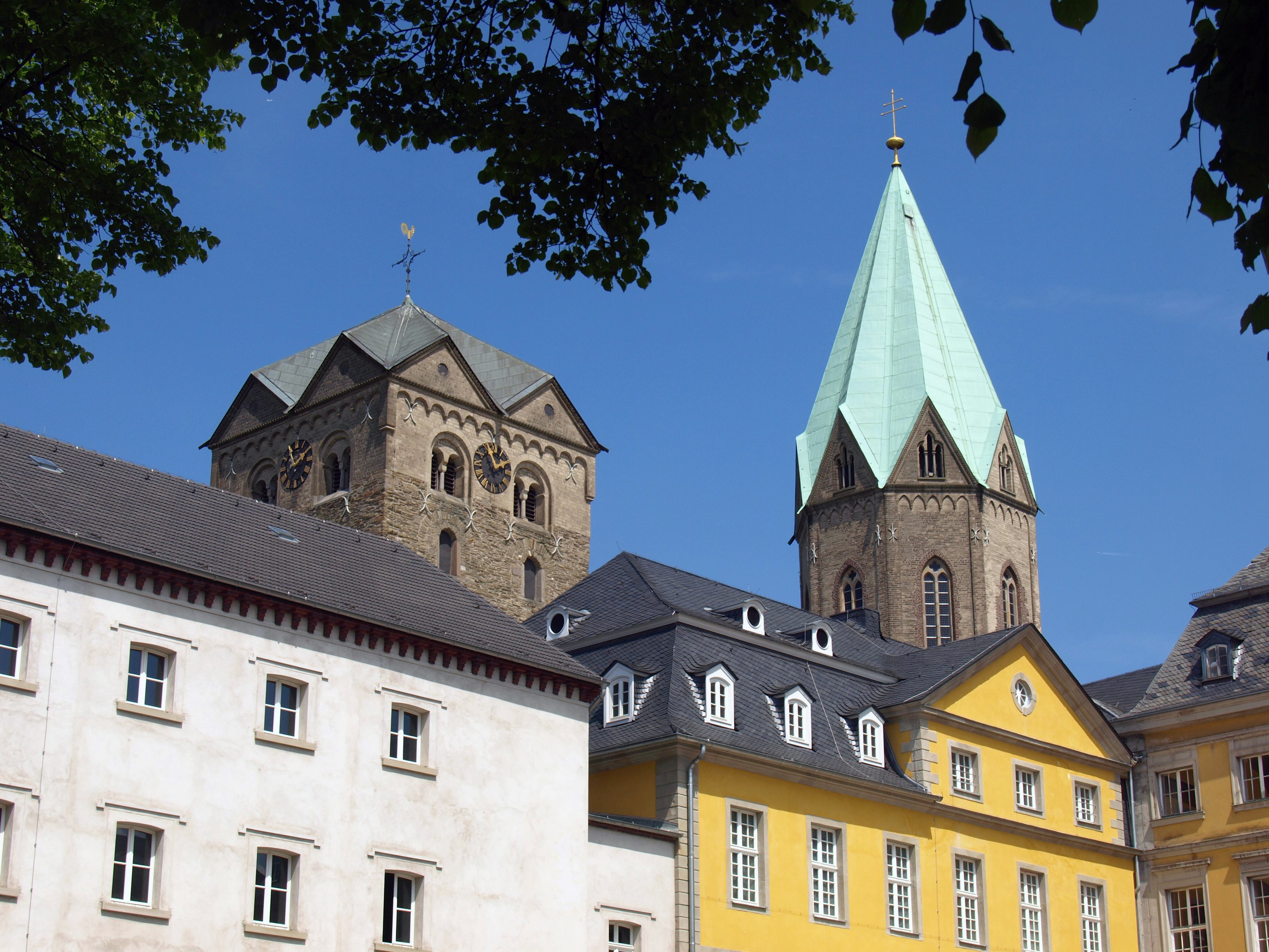 Северный Рейн-Вестфалия, Эссен, Верден - Верденское аббатство